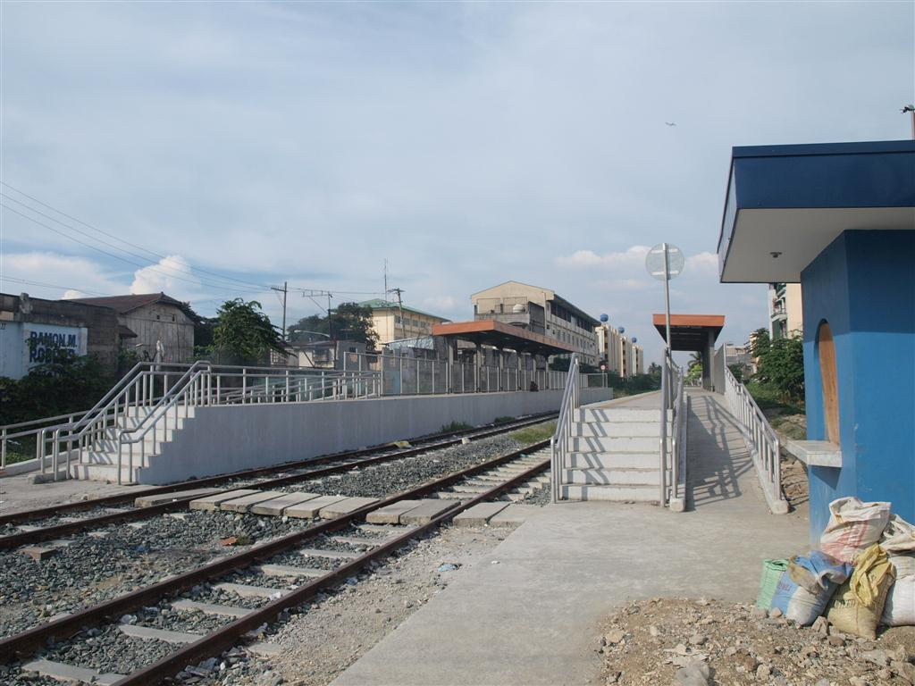 Solis railway station in Manila, Philippines